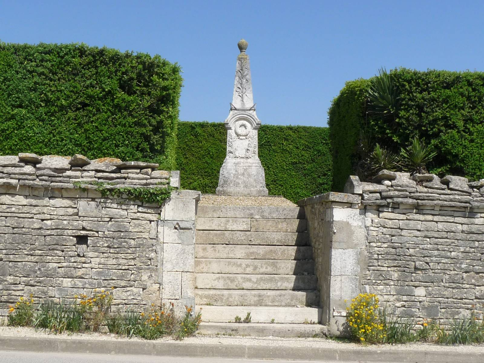 Monument aux morts 1914-18 de Ligné, Charente, France